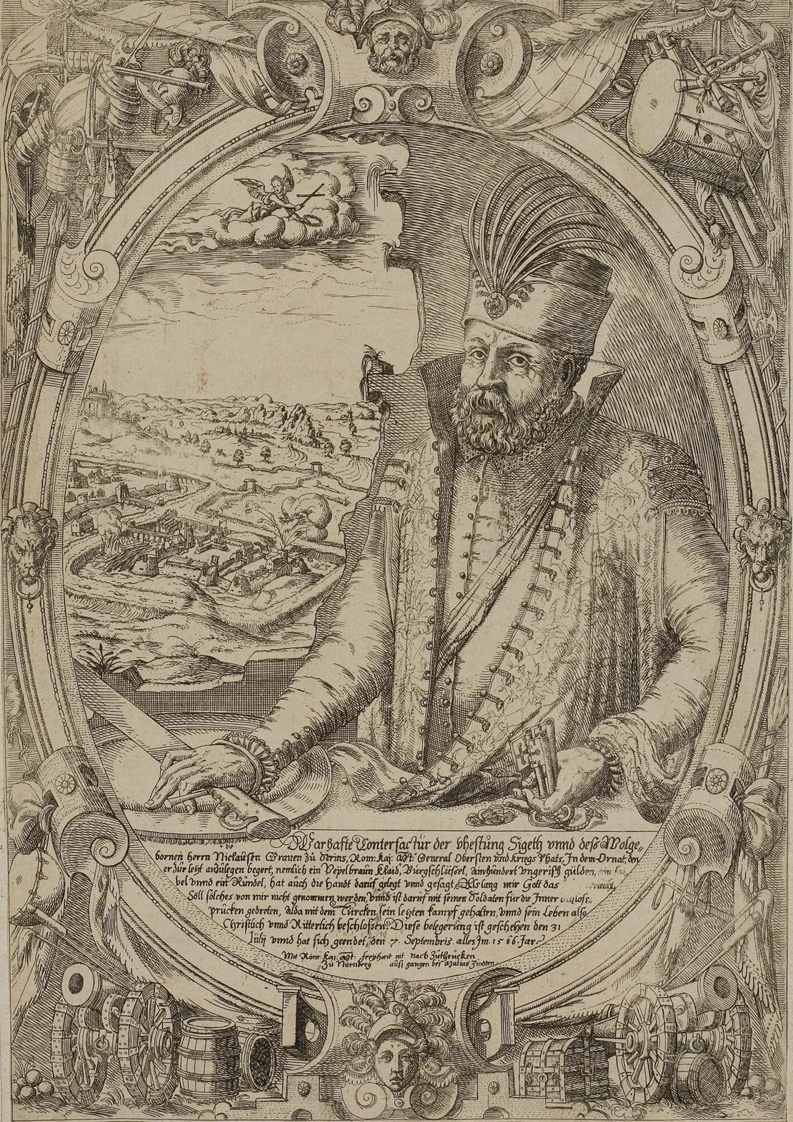 Grafik aus dem Klebeband Nr. 1 der Fürstlich Waldeckschen Hofbibliothek Arolsen, pg. 433 Motiv: Nikola IV Zrinski und die Schlacht von Szigetvár 1566